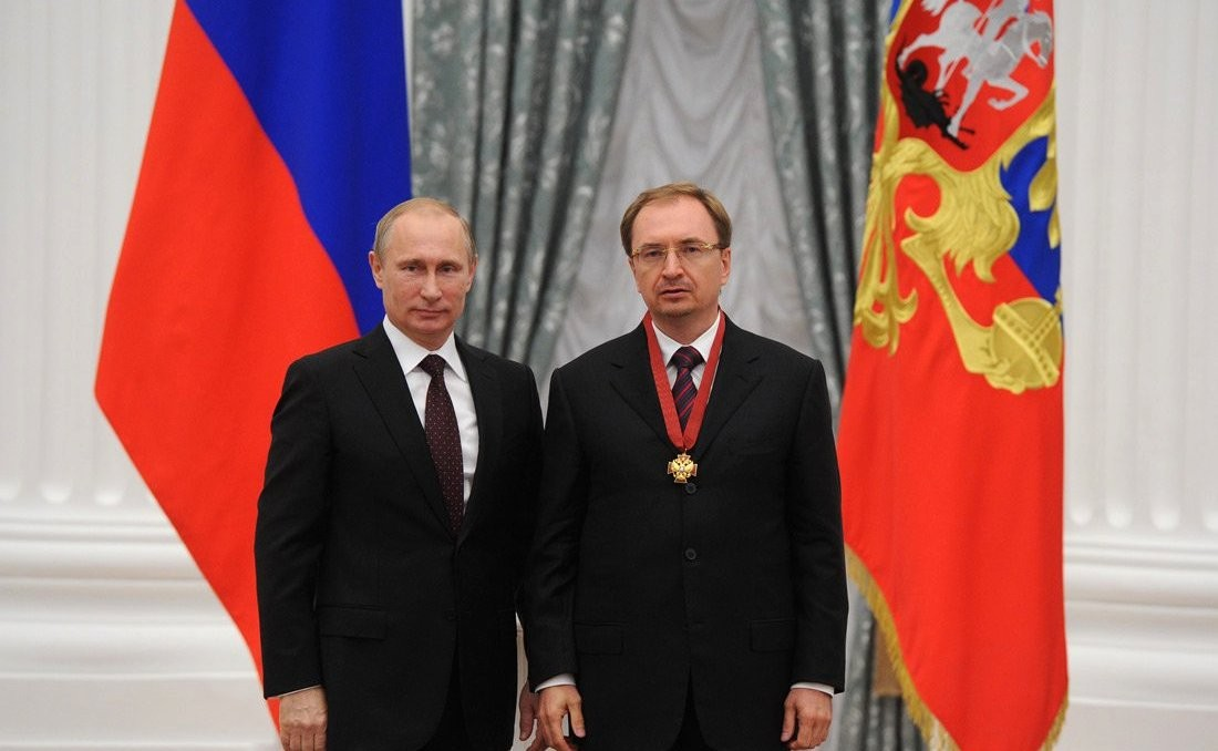 Орденом «За заслуги перед Отечеством» III степени награждён Николай Кропачев